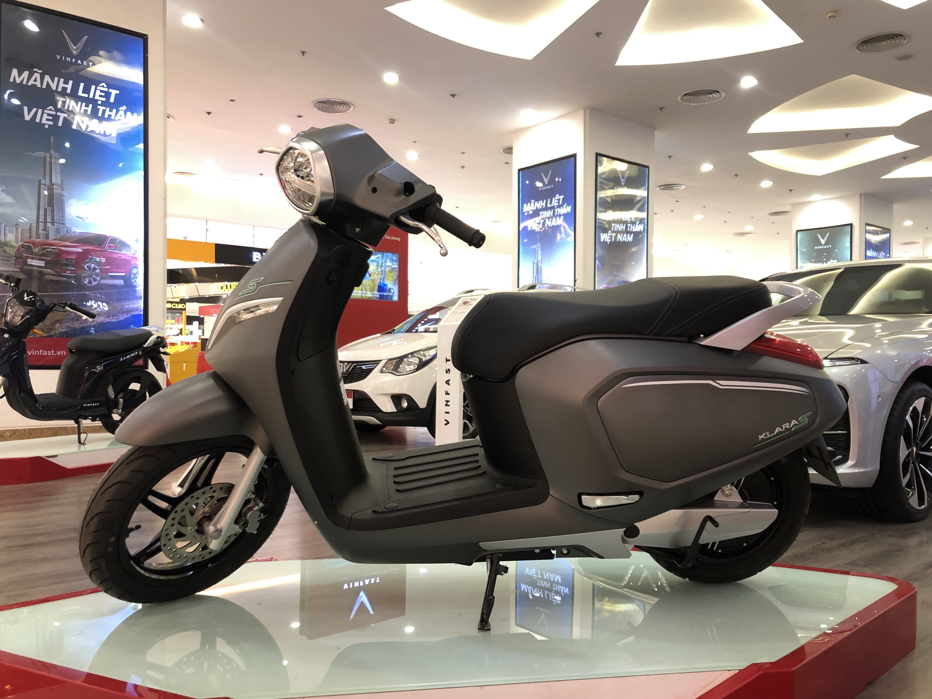 Xe máy điện VinFast Klara S tại Times City